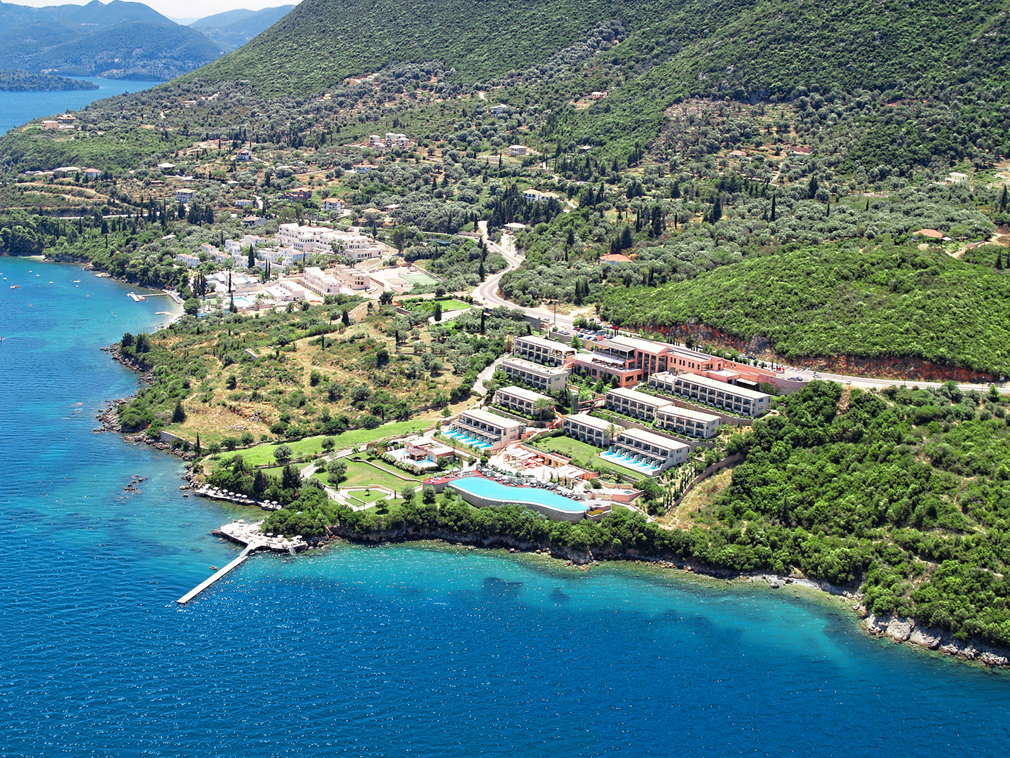 Ανατολική ακτή Λευκάδας.